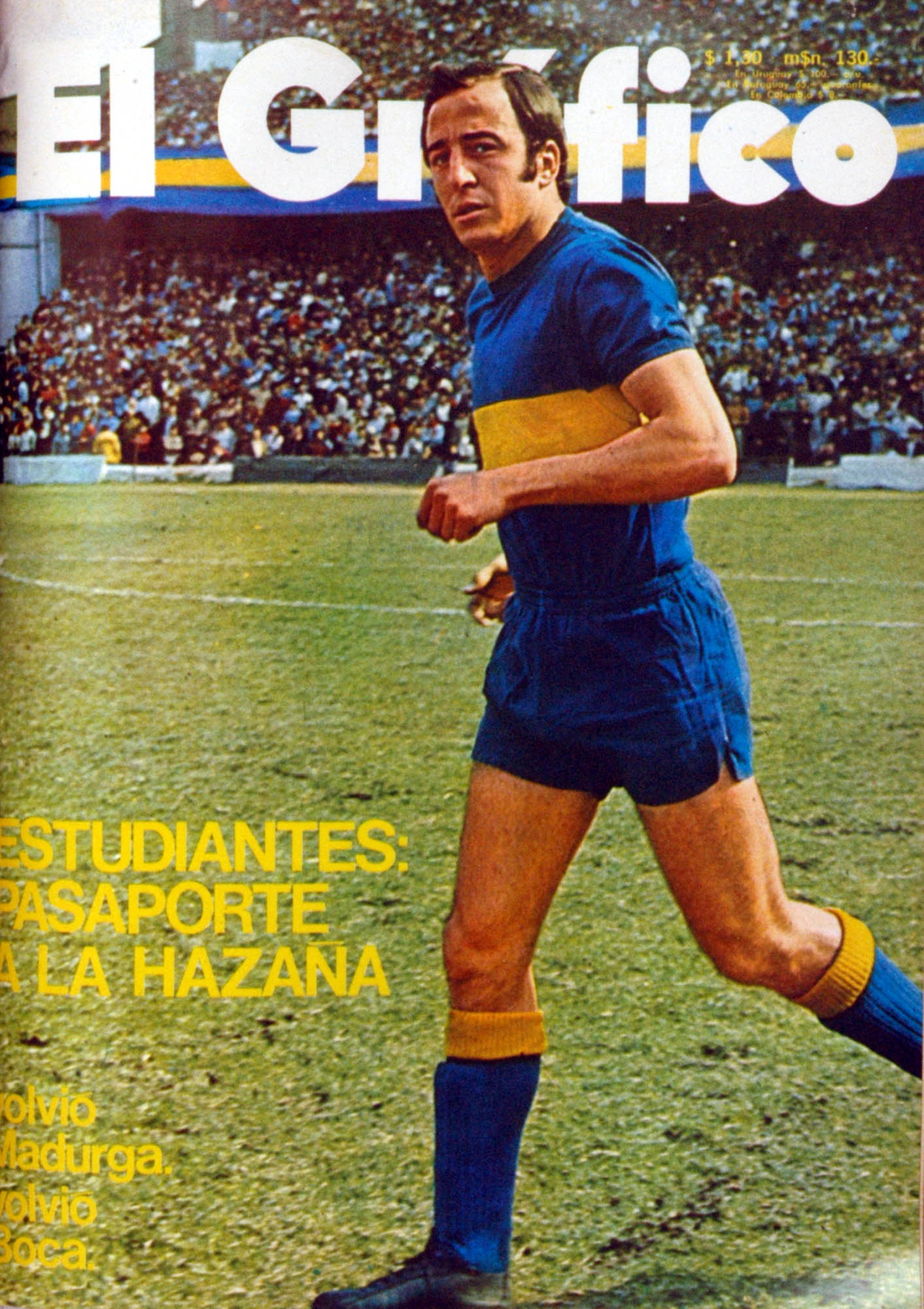 El Grafico del 08 de Junio de 1971. Edicion 2696